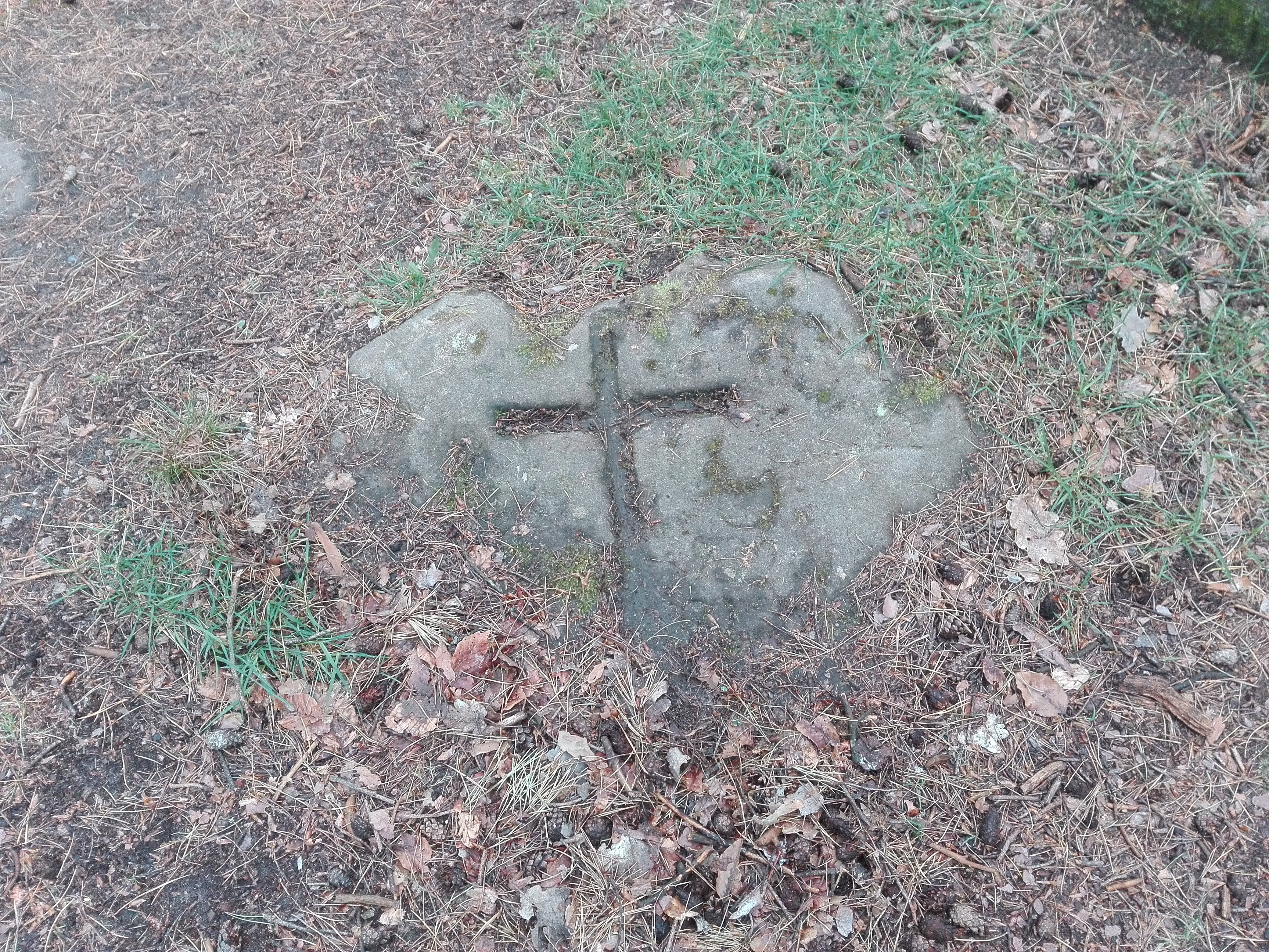 Weinbiet-Stein auf dem Weinbiet. Er markiert die Grenze Deidesheims zu Gimmeldingen